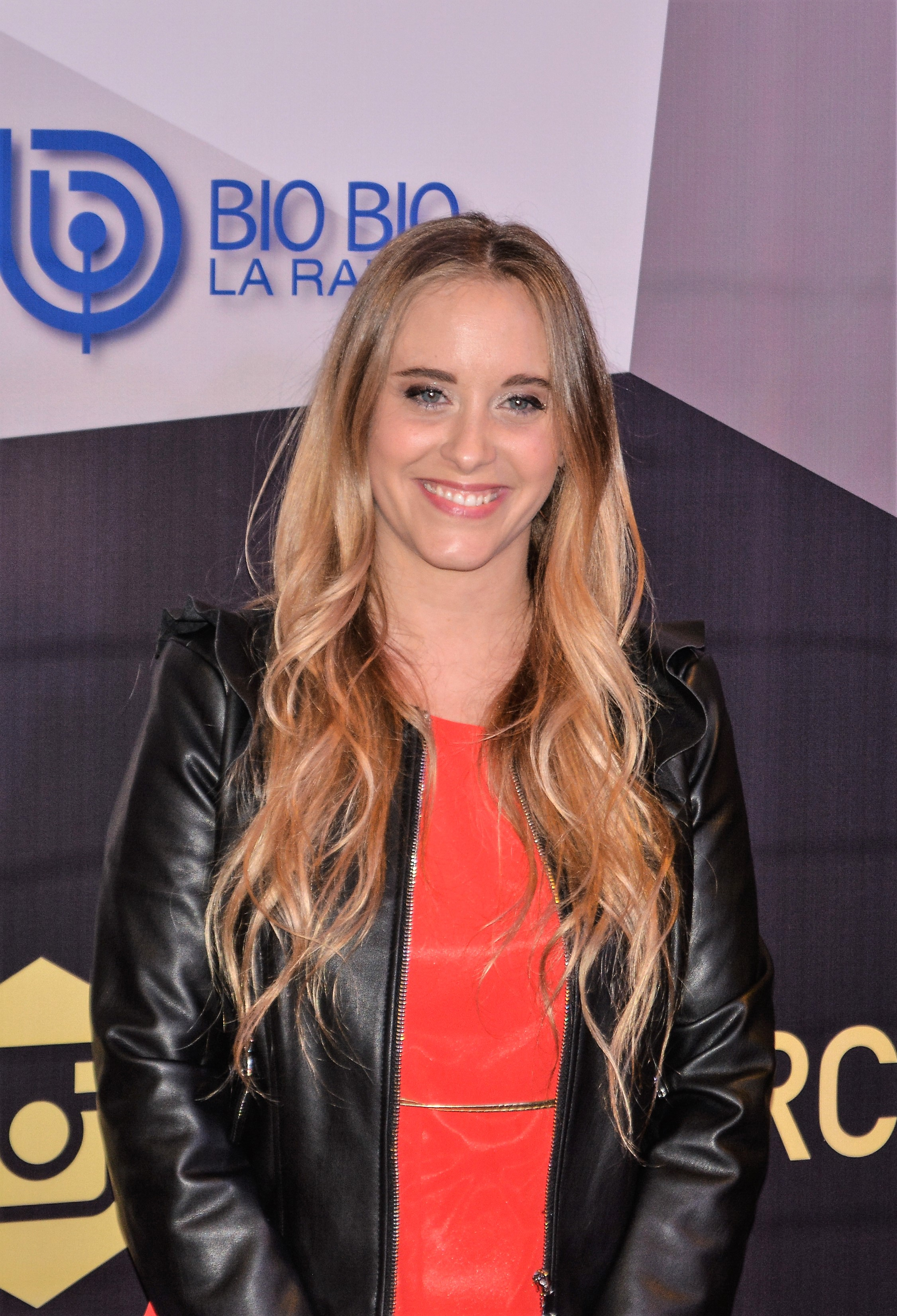 Premios Pulsar 2017